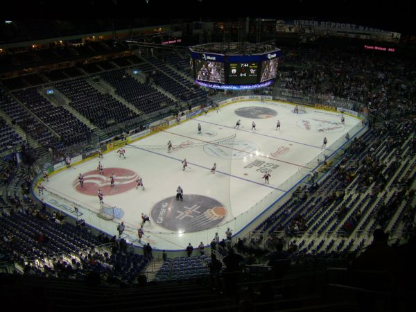 Vor dem Eishockeyspiel der Eisbären Berlin gegen die DEG Metro Stars am 20. November 2009 in der O² World Berlin.